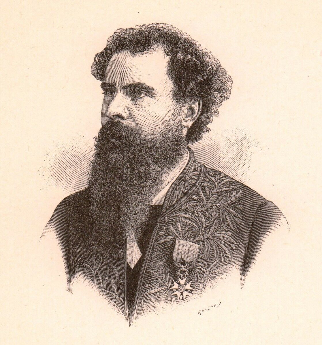 French economist Paul Leroy-Beaulieu (1843-1916)